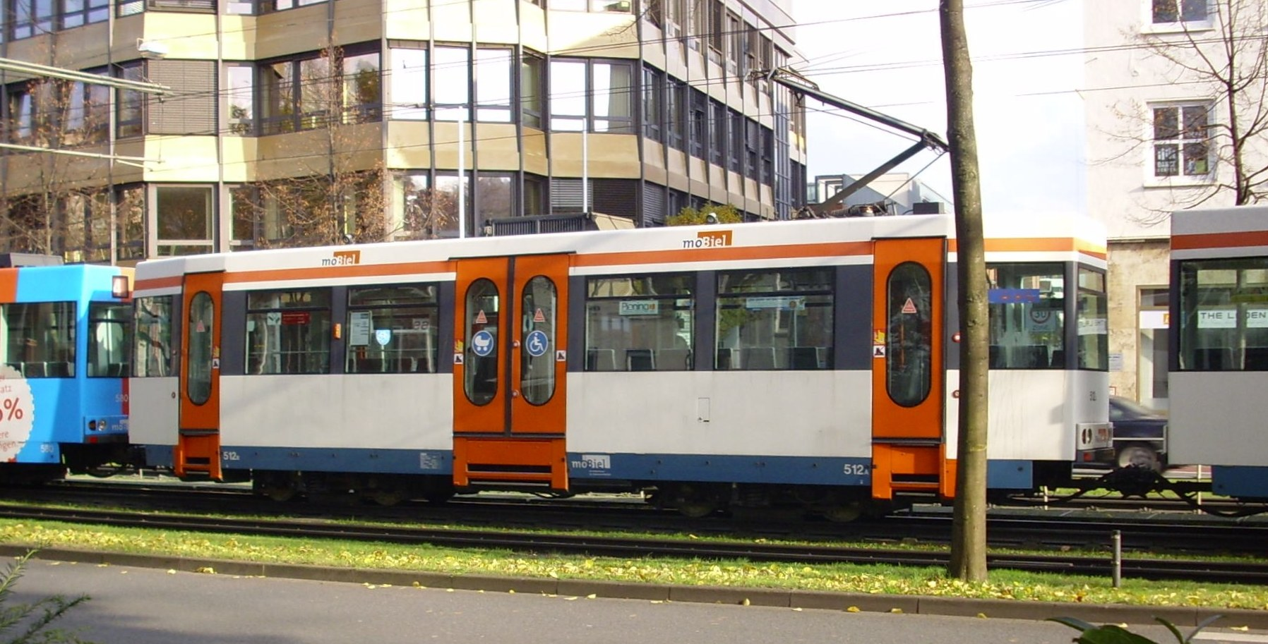 Doczepa bierna MB4 (prod. Siemens / AD Tranz).